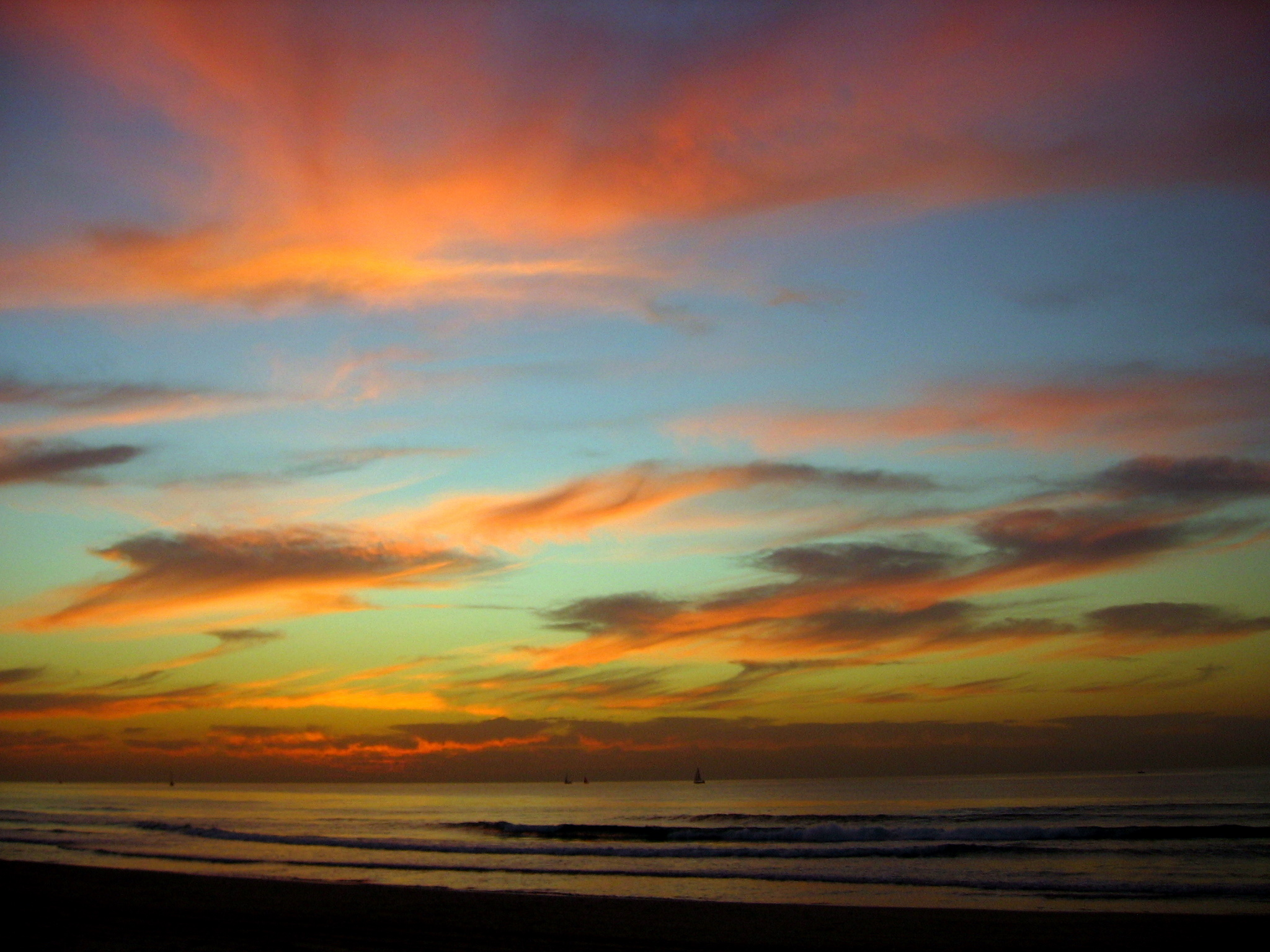 Dusk in Herzliya, Israel